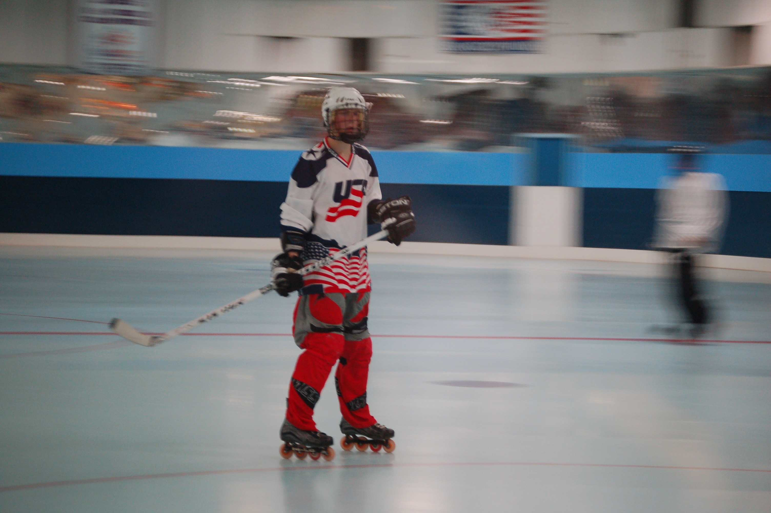 Inline Hockey at Albuquerque